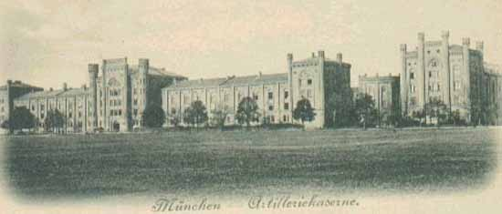 Artilleriekaserne in München